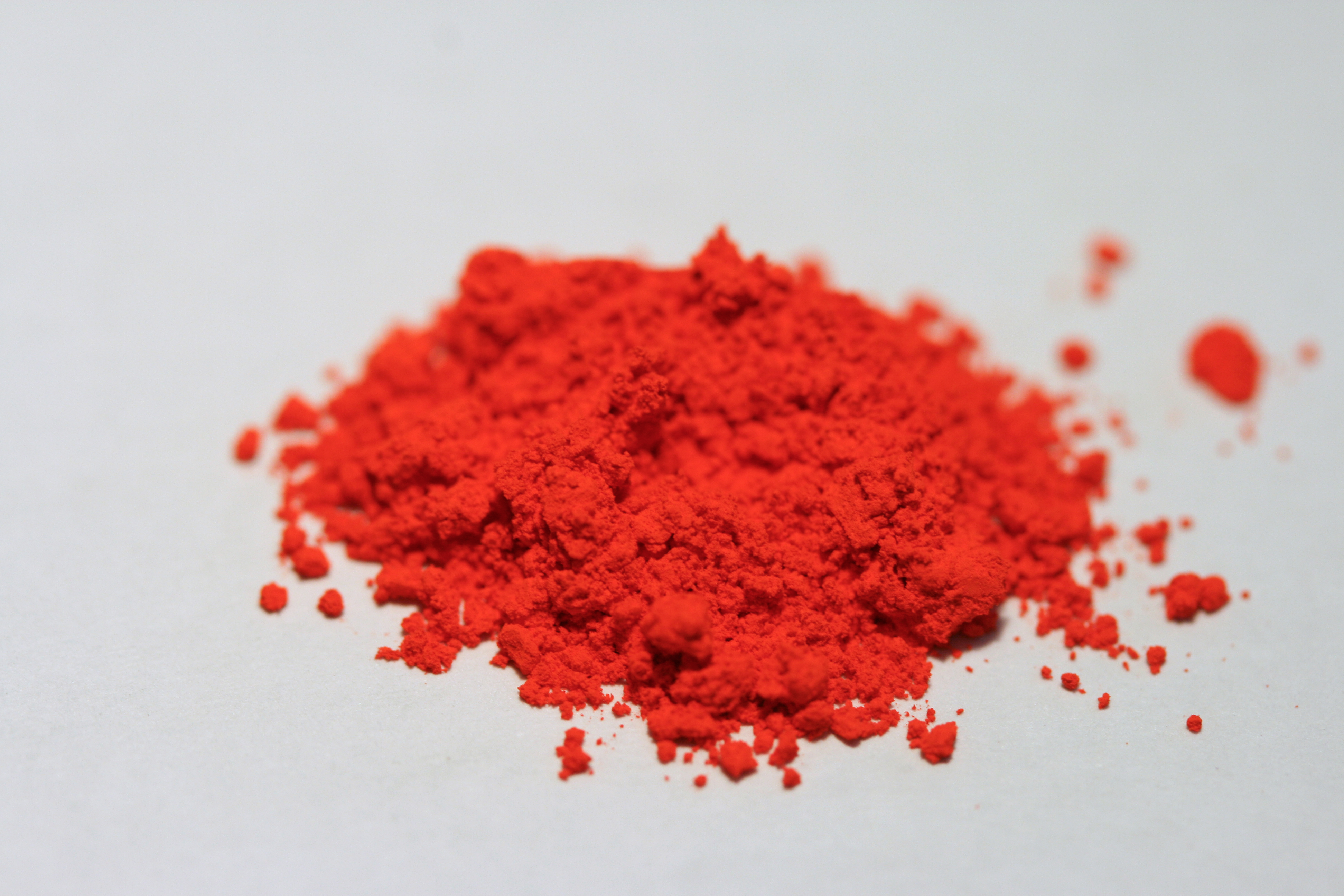 Echtorange Pigment